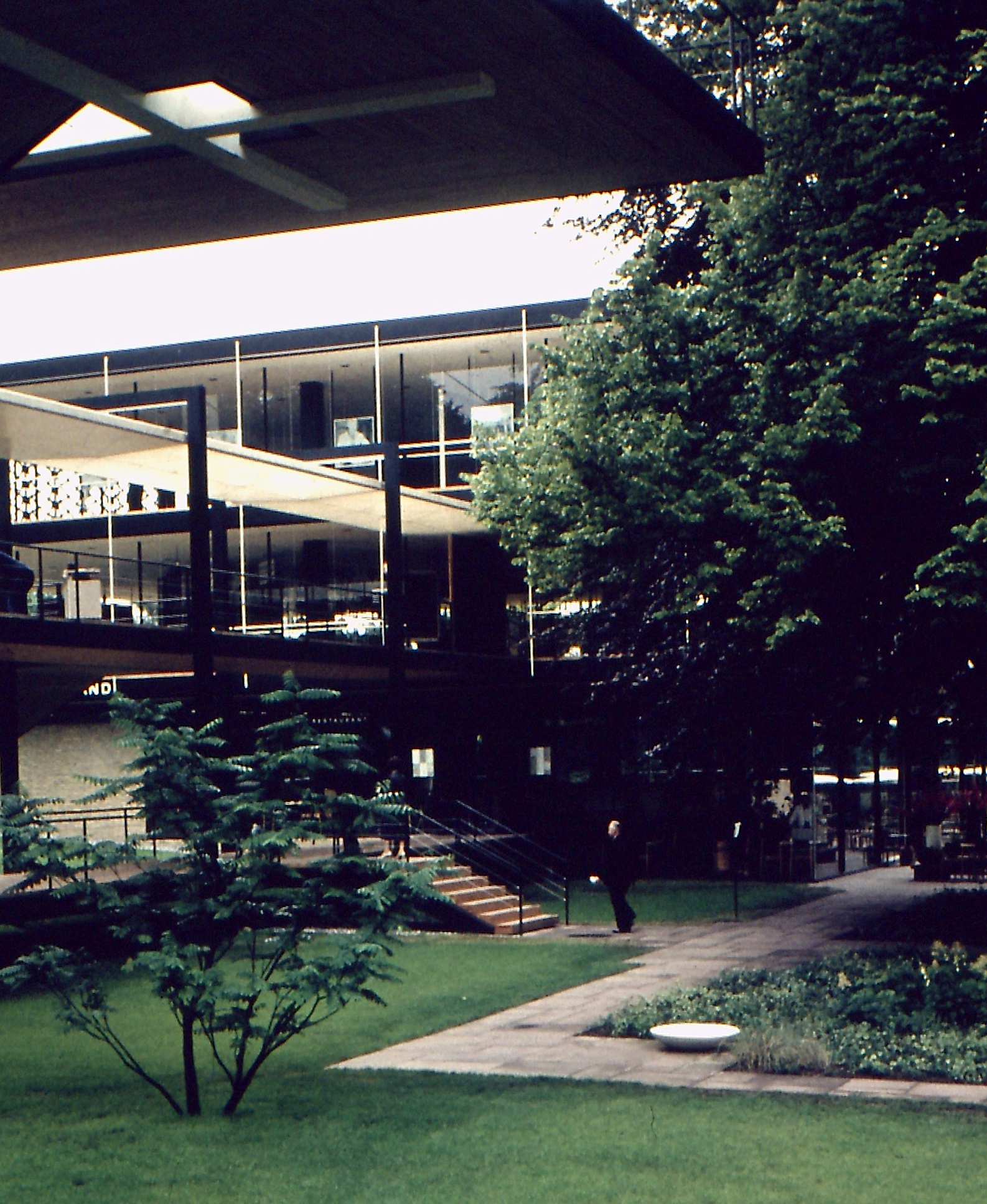 Expo Brüssel 1958 German pavilion